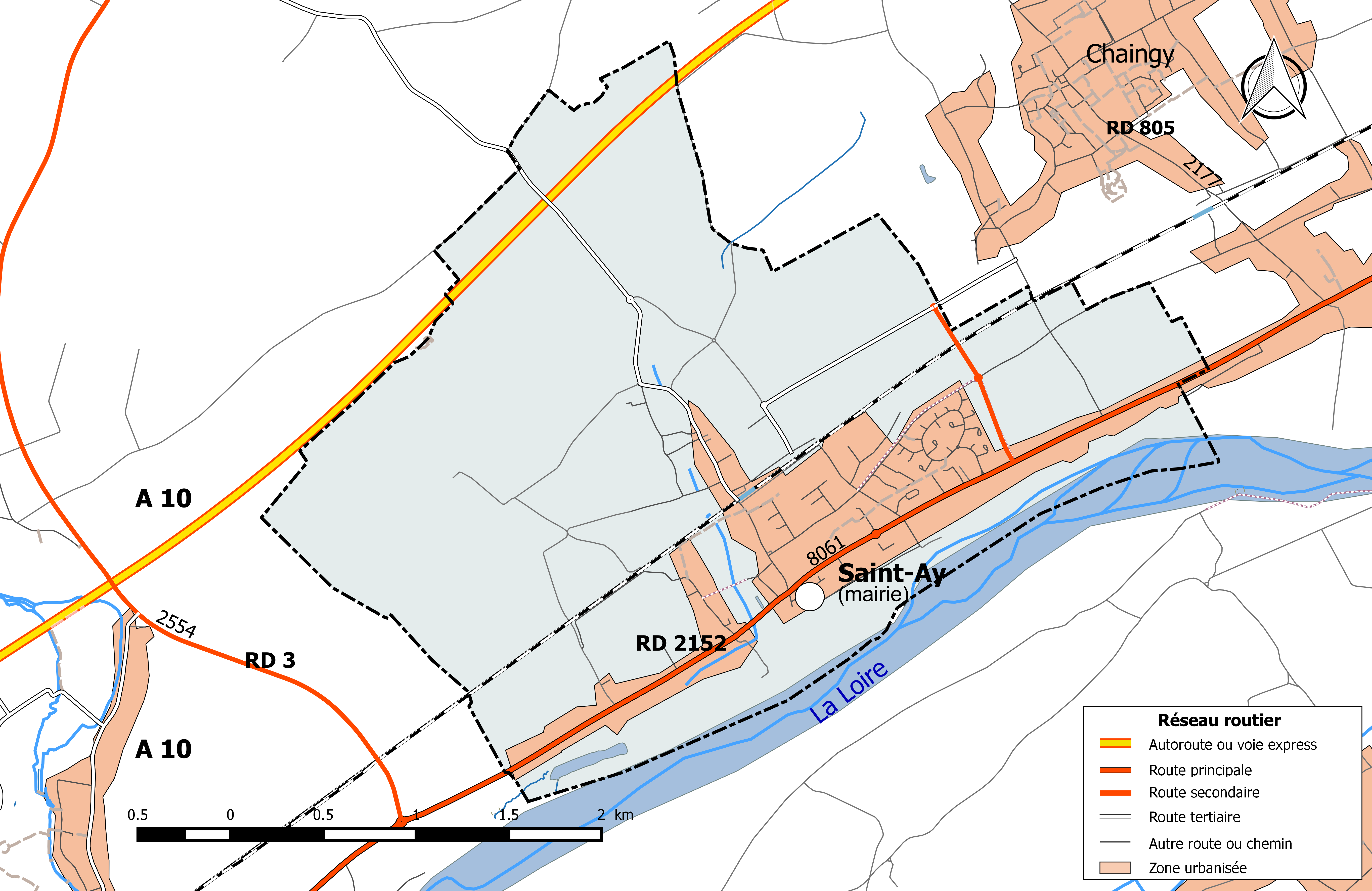 Carte du réseau routier de la commune de Saint-Ay.